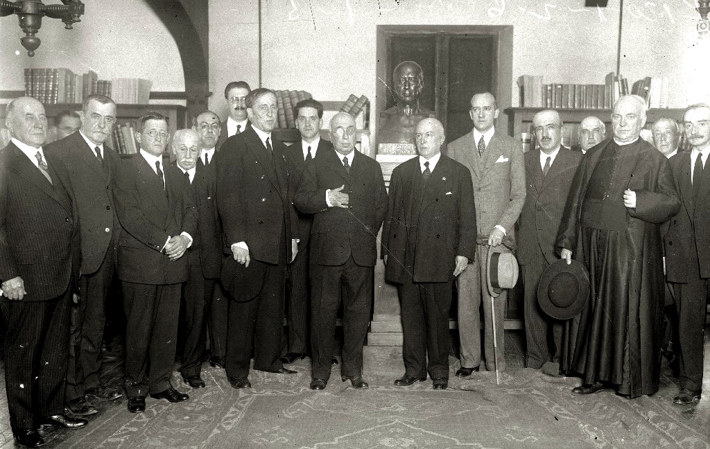 Título original: Diferentes personalidades en el homenaje a Arturo Campion, entre ellos se ecuentran Julián Elorza (presidente de la diputacion y de la Sociedad de Estudios Vascos), Carmelo Etxegaray, Julio Urquijo, Lizardi, Orixe y Aitzol (4/4) Localización: San Sebastián (Guipúzcoa)